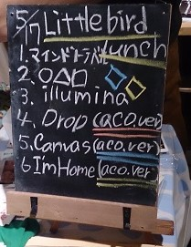 amiinaセトリボード(20150517(1))